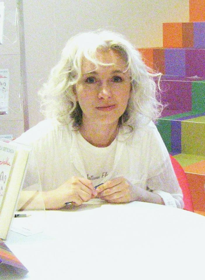 Manuela Gretkowska (ur. 6 października 1964 w Łodzi) - polska pisarka, scenarzystka filmowa, felietonistka i działaczka społeczna, założycielka polskiej Partii Kobiet.